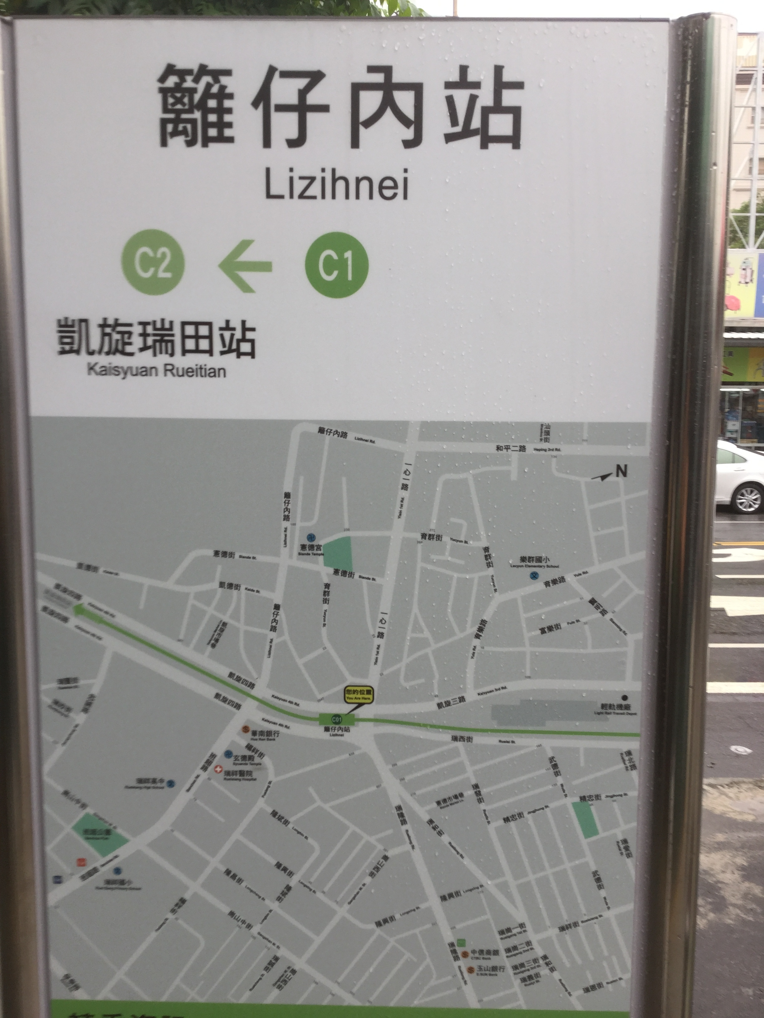 環狀輕軌籬仔內站名牌